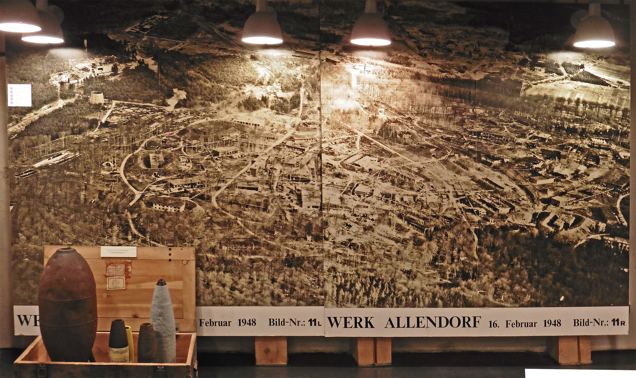 Kollage zweier Luftbilder (Schrägbild) des Sprengstoffwerks Allendorf (DAG) vom 16. Februar 1948 im Dokumentations- und Informationszentrum Stadtallendorf (DIZ) in Stadtallendorf. Im Vordergrund Hülsen von Bomben und Granaten, die dort in der Zeit des Nationalsozialismus mit TNT befüllt wurden.